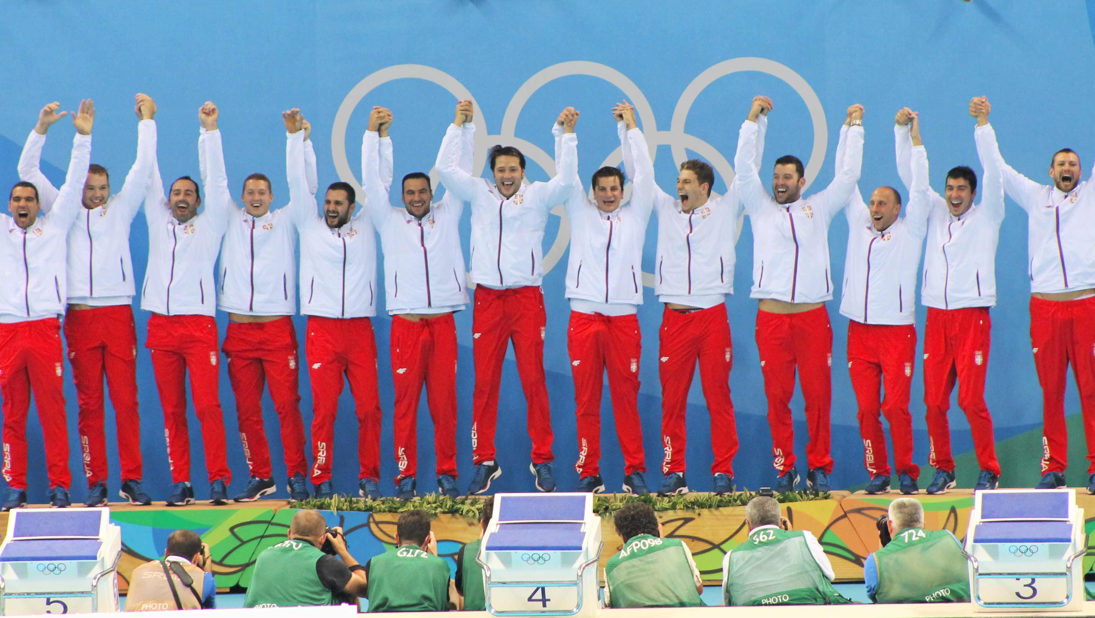 Equipe Sérvia, campeã de pólo aquático na Rio 2016